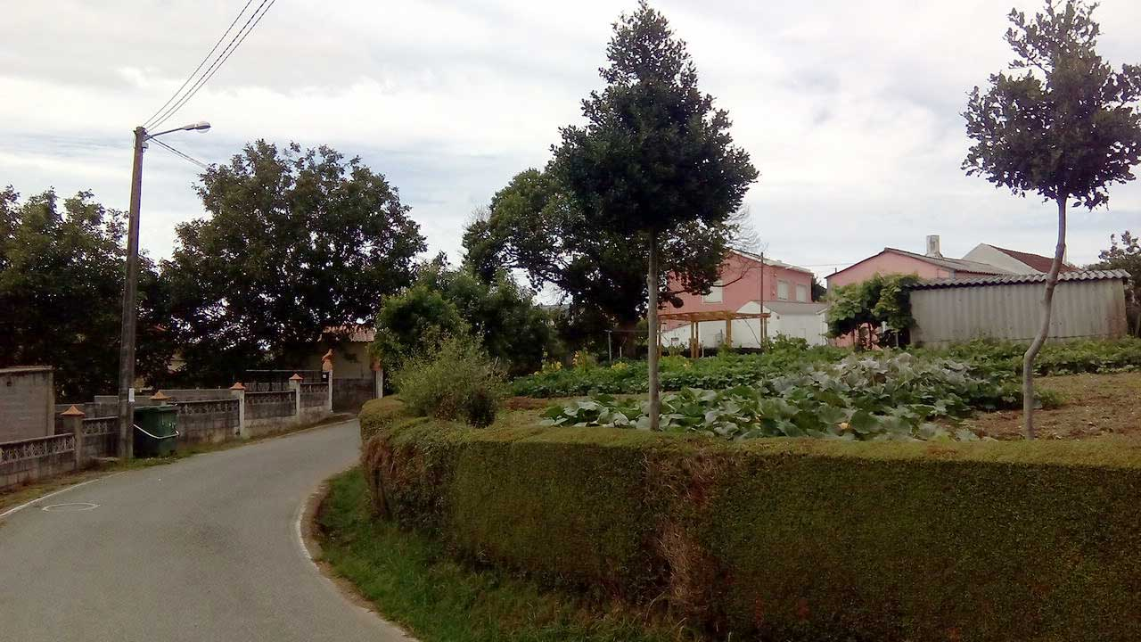 Vista do Vilar da Faisca, O Couto.